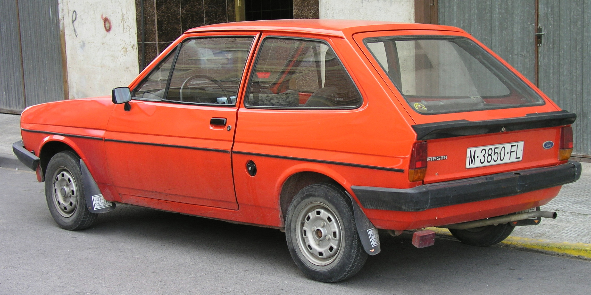 Ford Fiesta español de la primera serie.